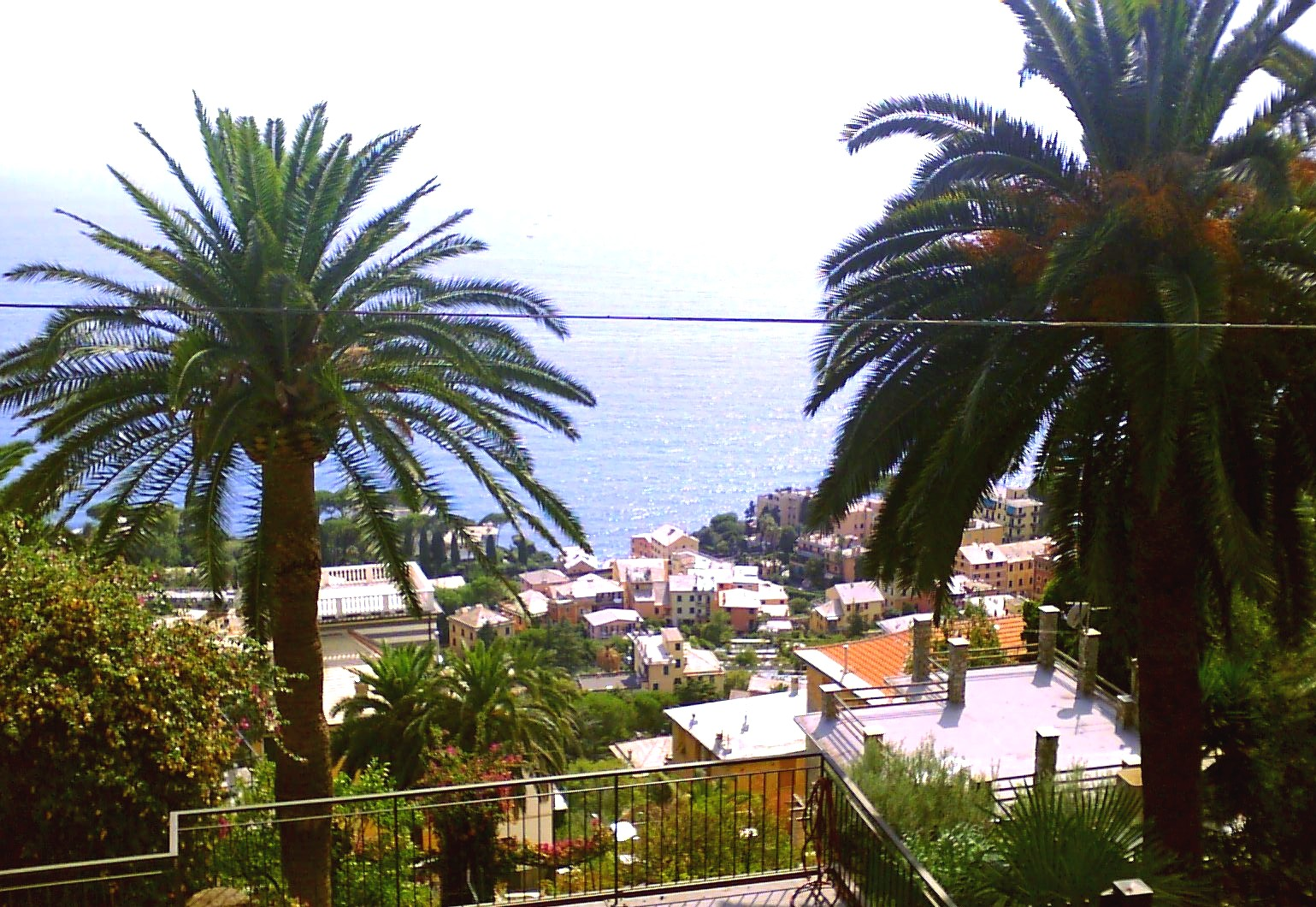 Sant'Ilario, Genova, Liguria, Italia